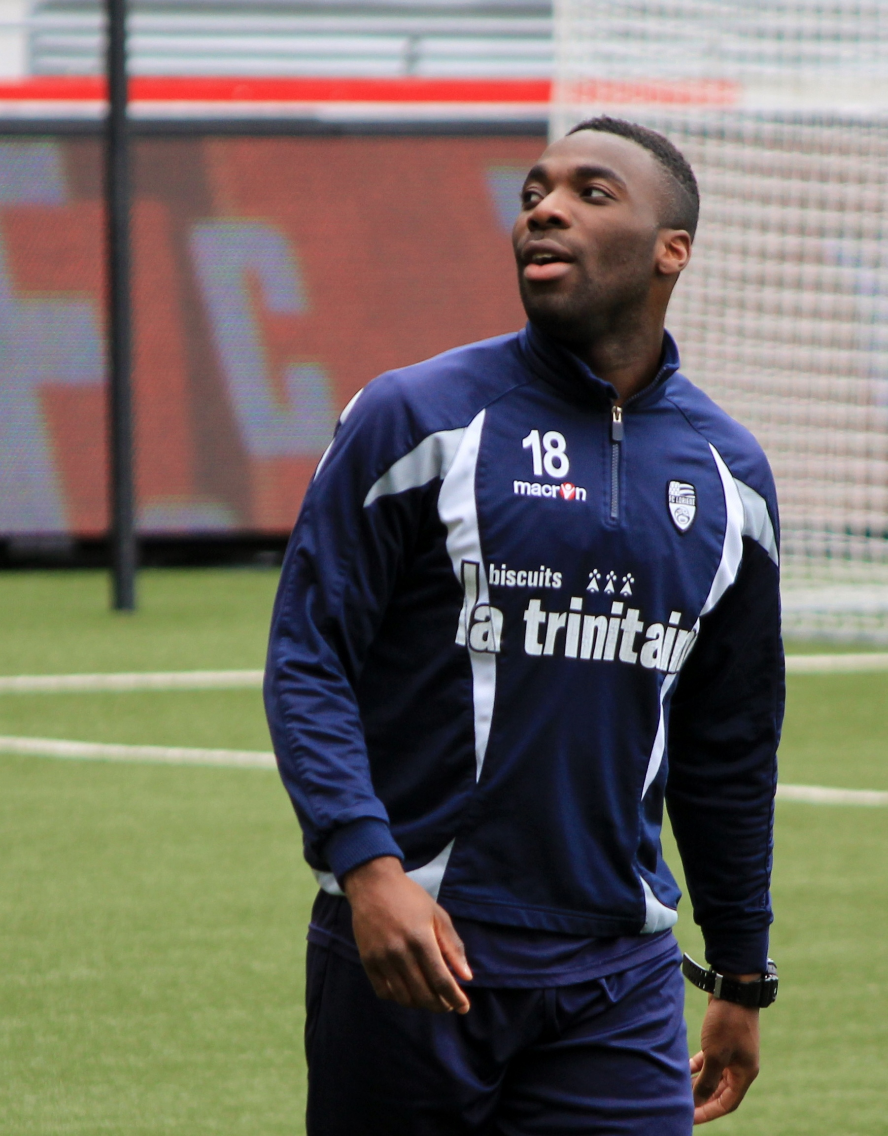 Gilles Sunu pendant un entrainement du FC Lorient le 24 mai 2013